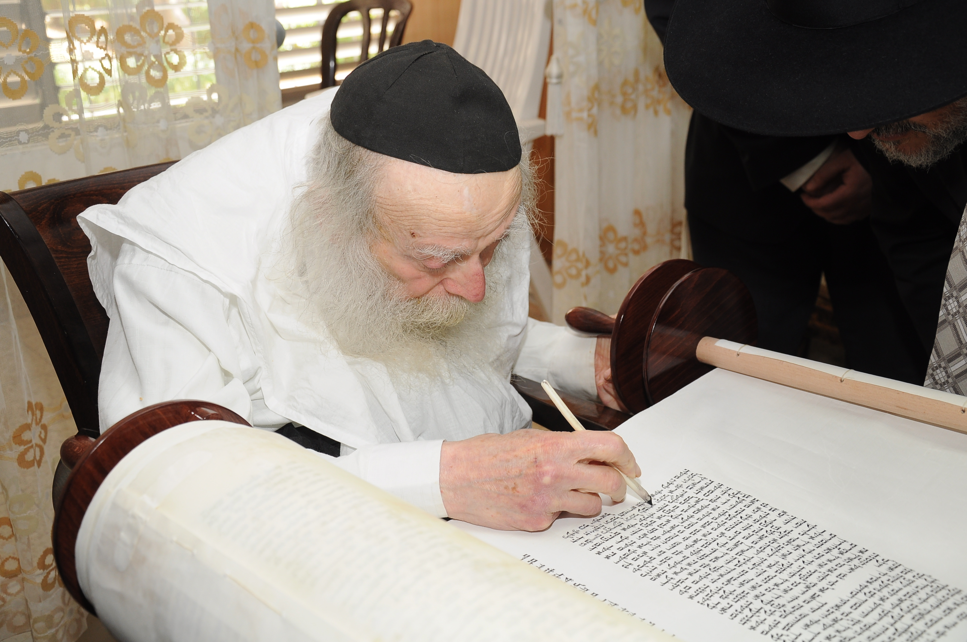 רב שמריהו יוסף נסים קרליץ הוא פוסק הלכה חרדי-ליטאי , אב"ד בבני ברק, חבר מועצת גדולי התורה